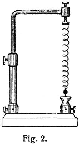 Der in Fig. 2 dargestellte Apparat (Rogetsche Spirale) zeigt die Anziehung gleichgerichteter Ströme sehr deutlich. An einem Arm hängt eine Drahtspirale, die mit ihrem unteren Ende in ein Gefäß mit Quecksilber eintaucht. Leitet man durch den Arm einen Strom in die Spirale, der durch das Quecksilbernäpfchen wieder austritt, so fließt der Strom durch alle Windungen der Spirale in gleicher Richtung. Die einzelnen Windungen ziehen sich infolgedessen an, wodurch die Spirale etwas kürzer wird. Hierdurch wird das untere Ende derselben aus dem Quecksilber herausgezogen und der Strom unterbrochen. Nun dehnt sich die Spirale wieder aus, ihr Ende taucht wieder in das Quecksilber ein, und so fängt das Spiel von neuem an; es kommt also die vom Strome durchflossene Spirale in Schwingungen; sie schwingt auf- und abwärts.